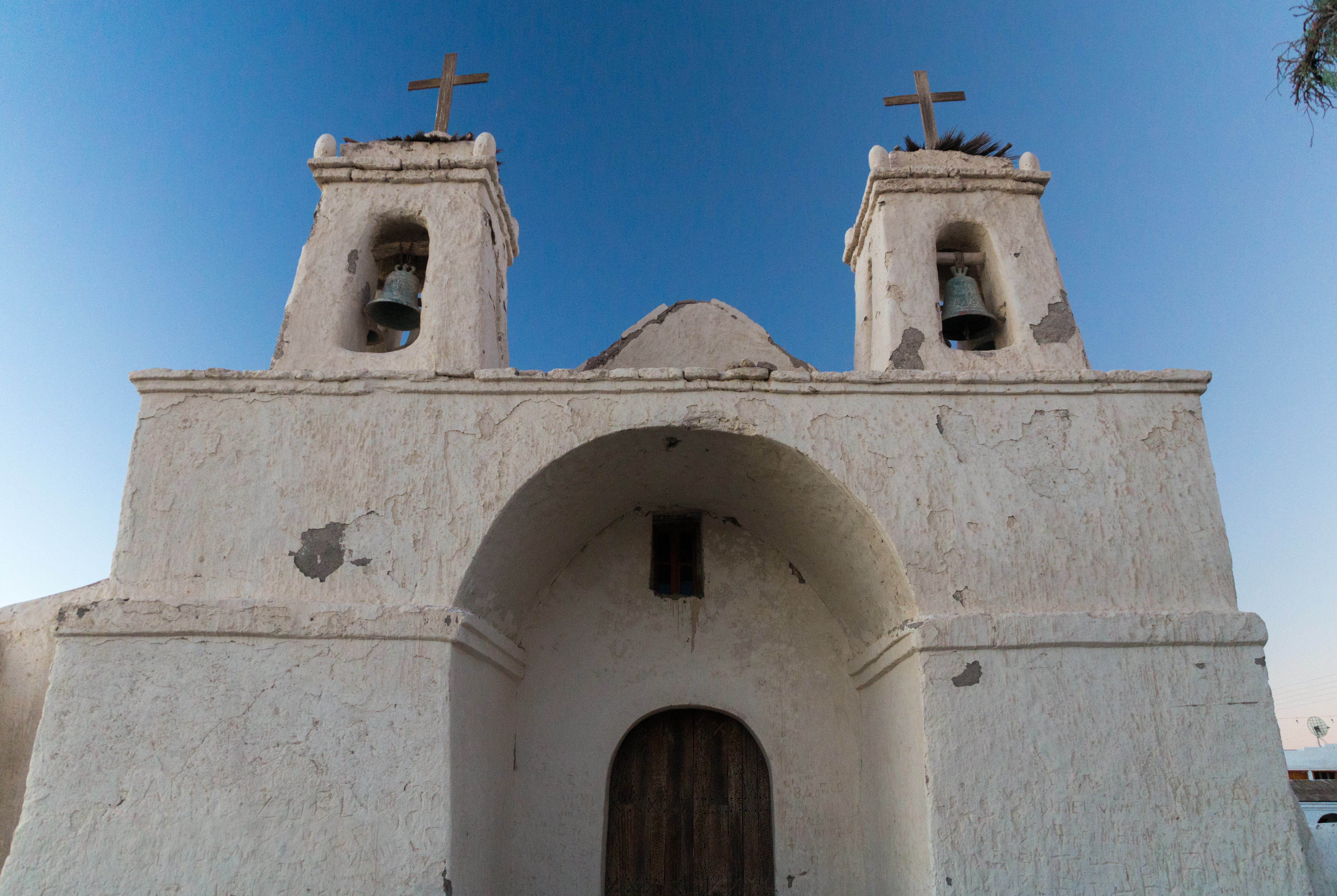 Vista frontal de la Iglesia de San Francisco de Chiu Chiu. This is a photo of a national monument in Chile: 541